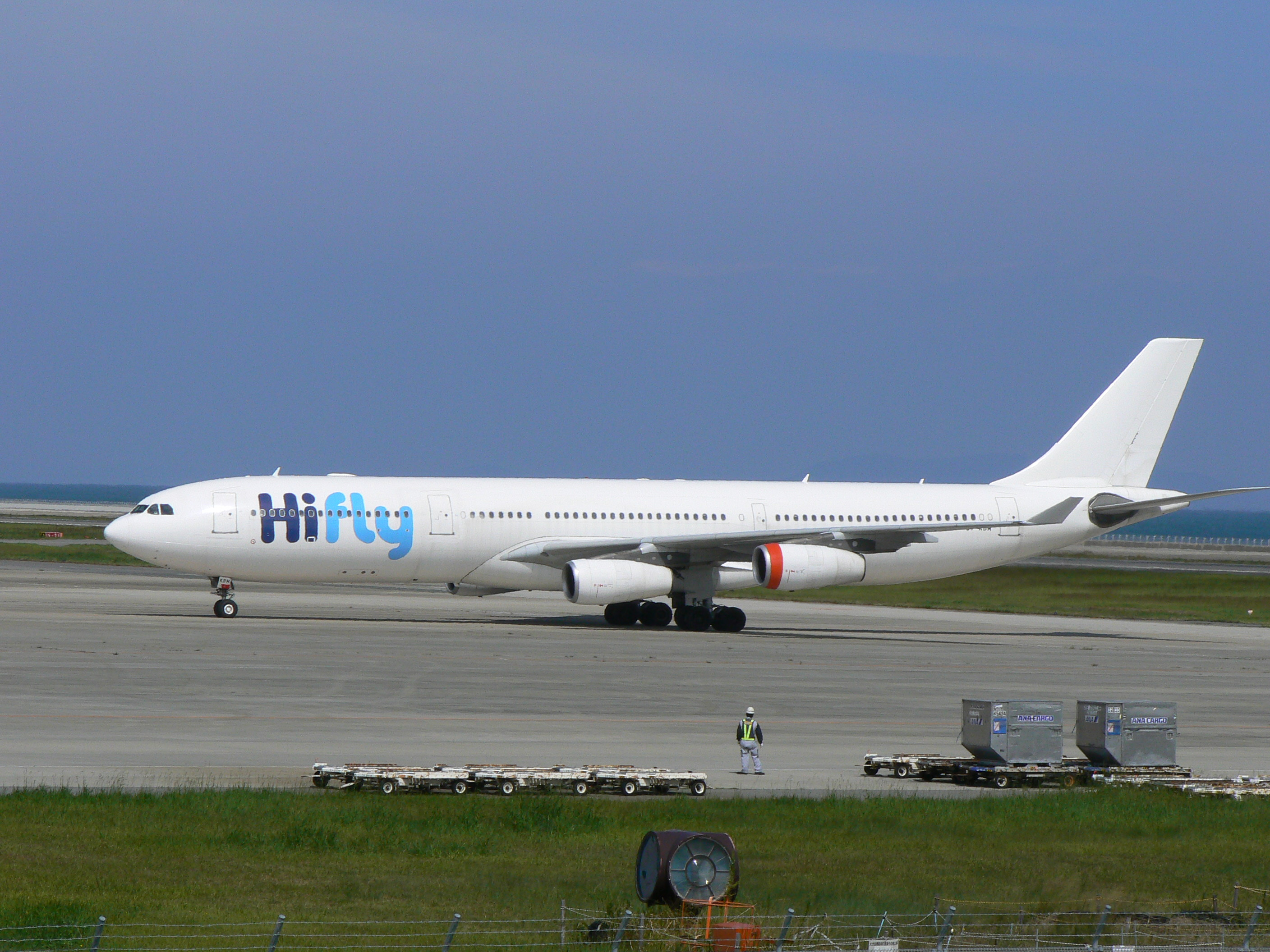 大分空港に飛来したハイフライ航空A340